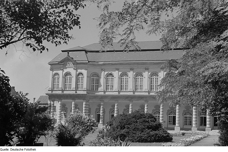 Original image description from the Deutsche Fotothek Orangerie im Schlossgarten